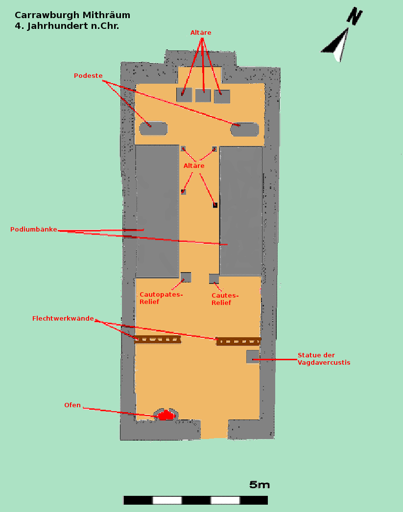 Befundskizze des Mithräums von Carrawburgh/Brocolitia, 4. Jahrhundert n.Chr., Hadrianswall (GB).